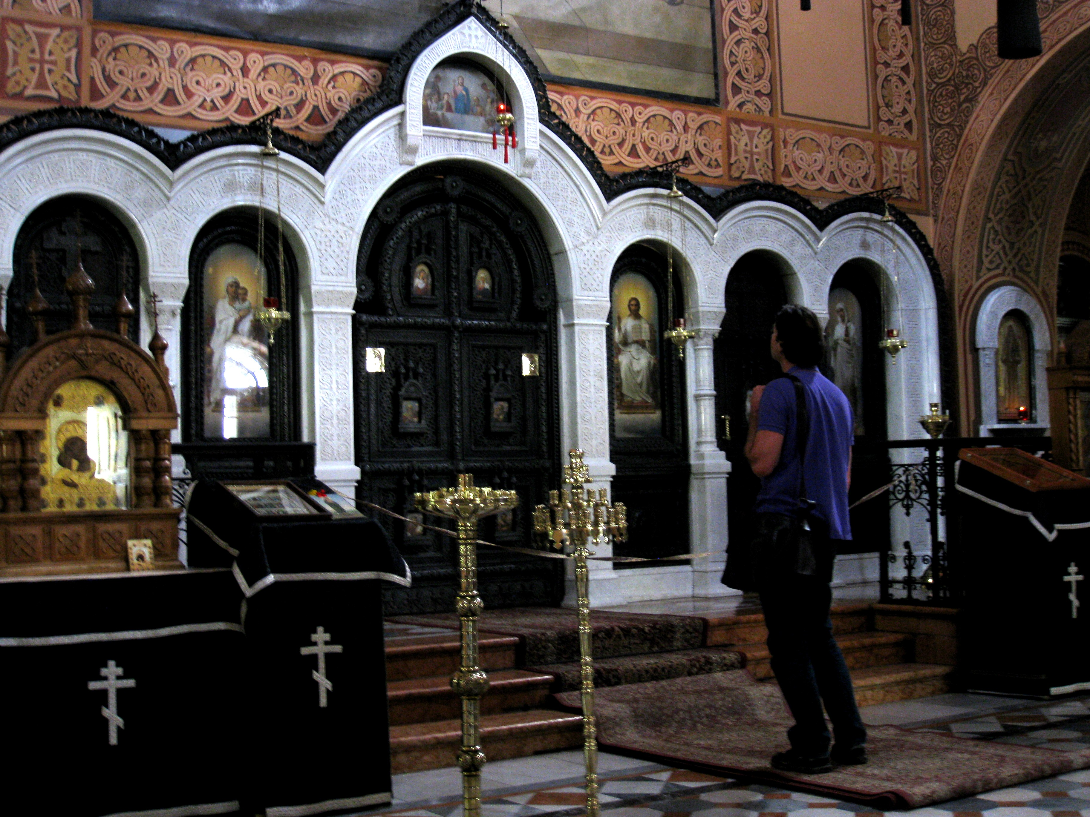 Church of Saint Mary Magdalene כנסיית מריה מגדלנה (כנסיית הבצלים)